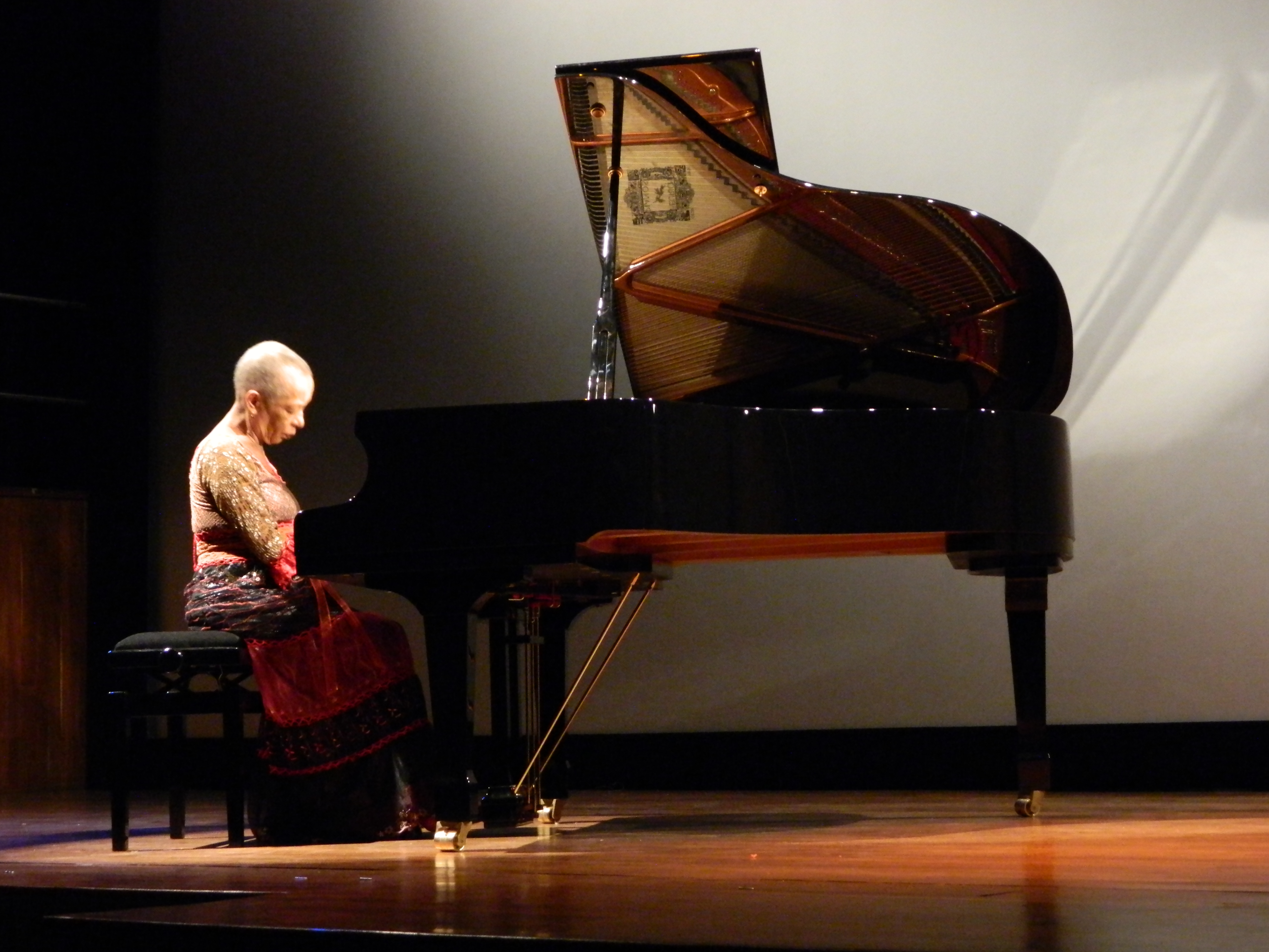 Foto tomada en el homenaje realizado a la maestra Teresita Gómez en Medellín, Colombia el 31/01/2013